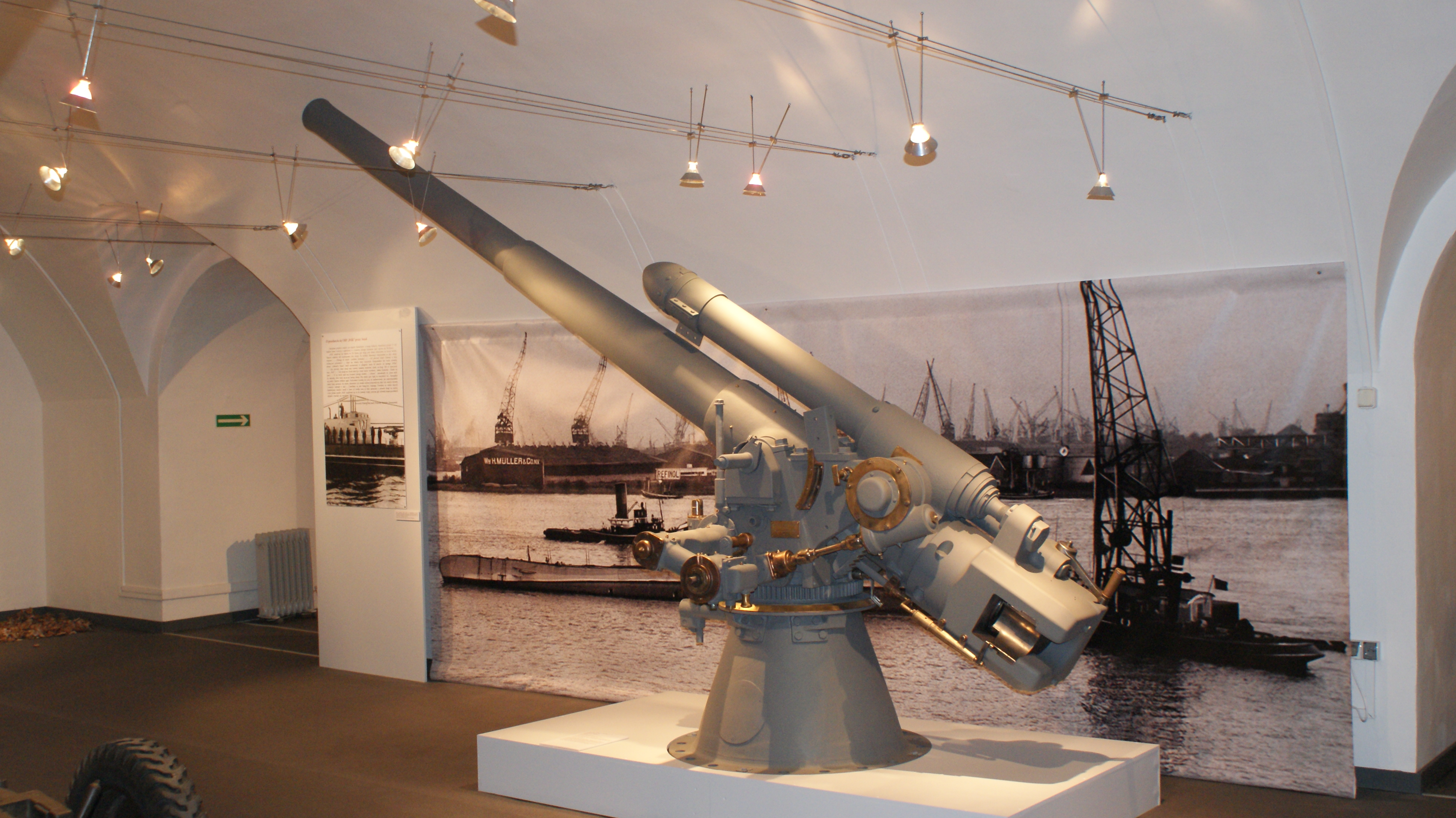 105 mm armata Bofors wz. 36, ORP Sęp, eksponat Muzeum Polskiej Techniki Wojskowej, Warszawa, ul. Powsińska 13